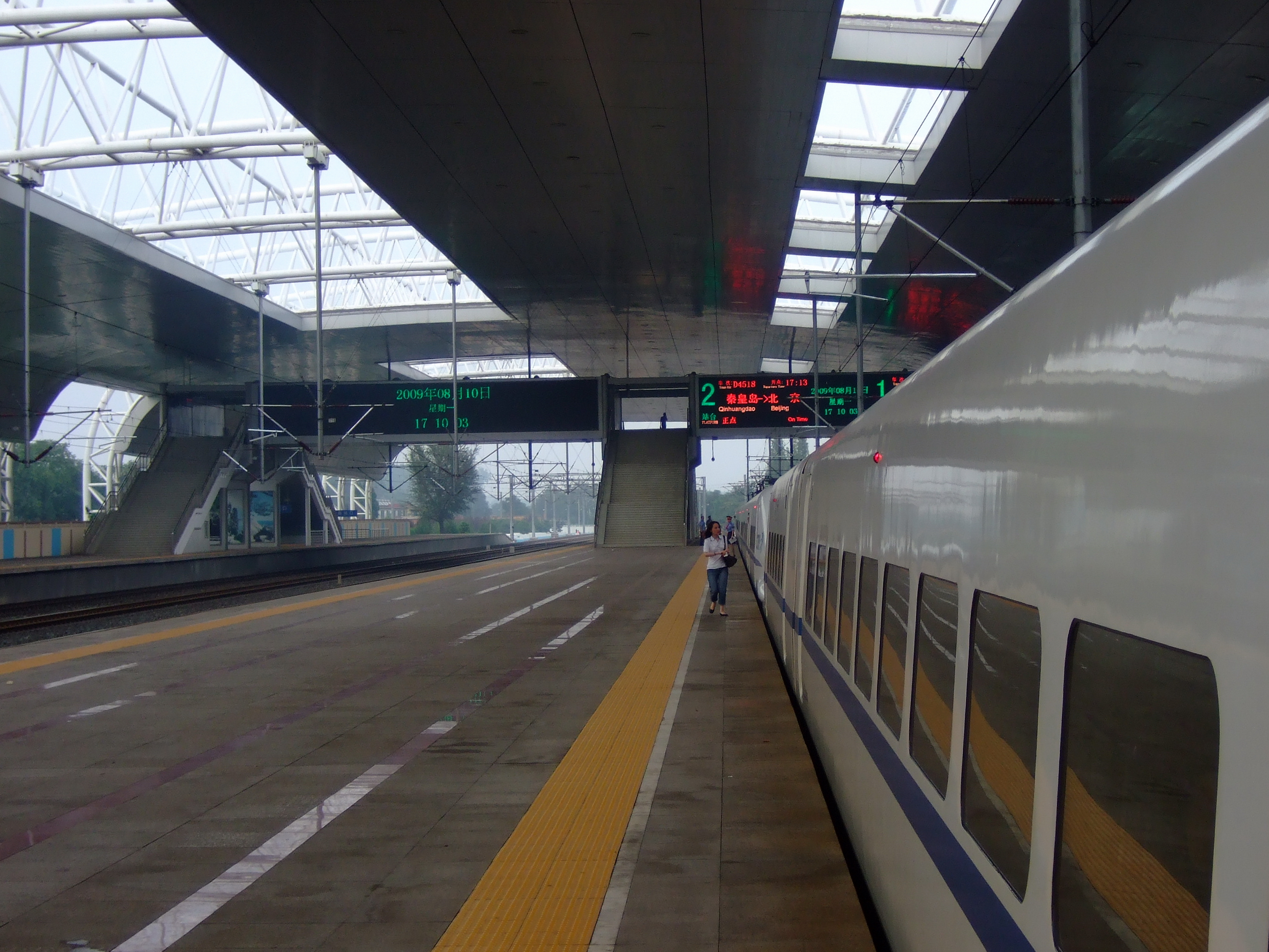 中文（中国大陆）: 北戴河火车站站台